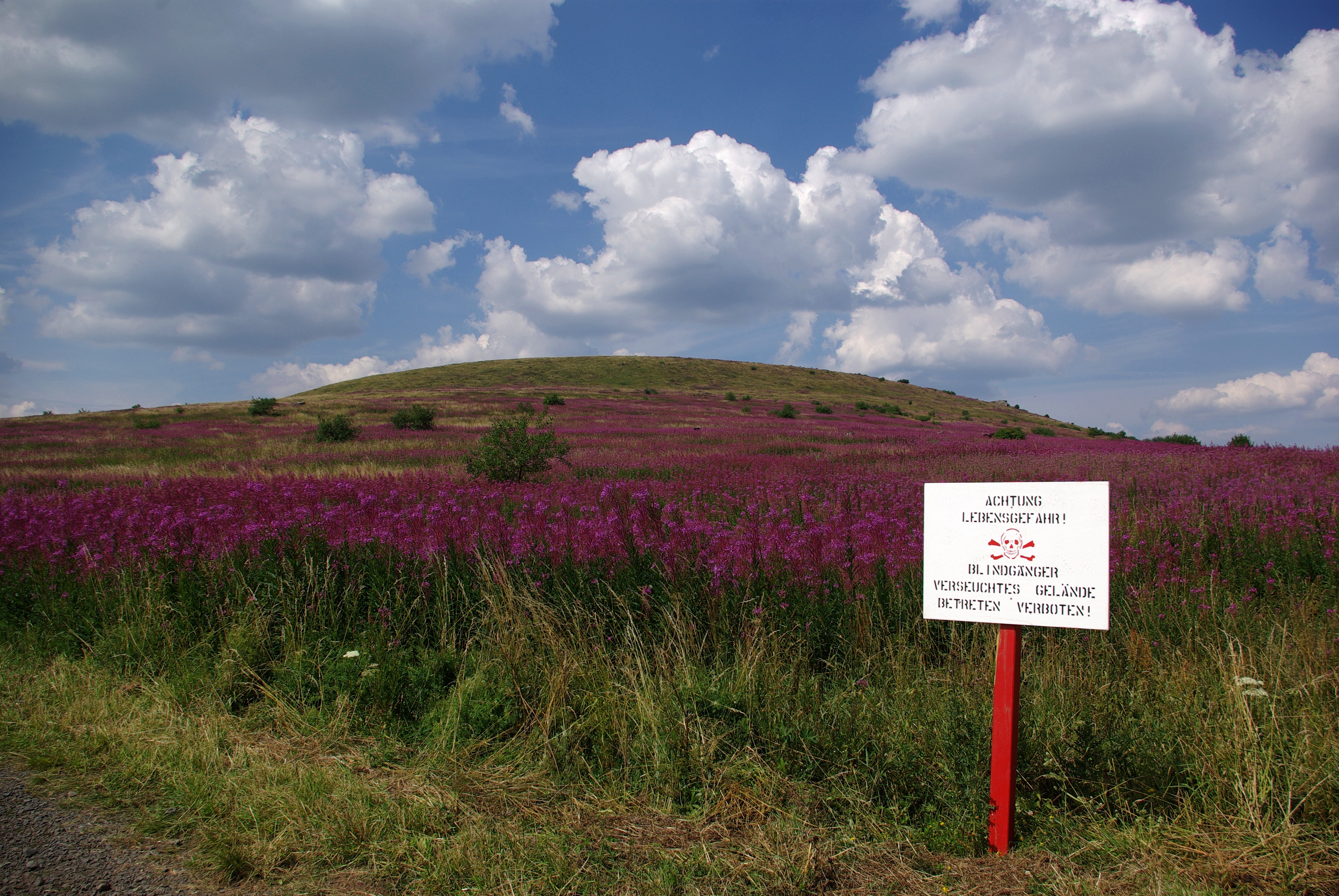 Das Dammersfeld im Truppenübungsplatz Wildflecken in der Rhön